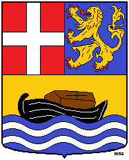 Wapen van de gemeente Elst.